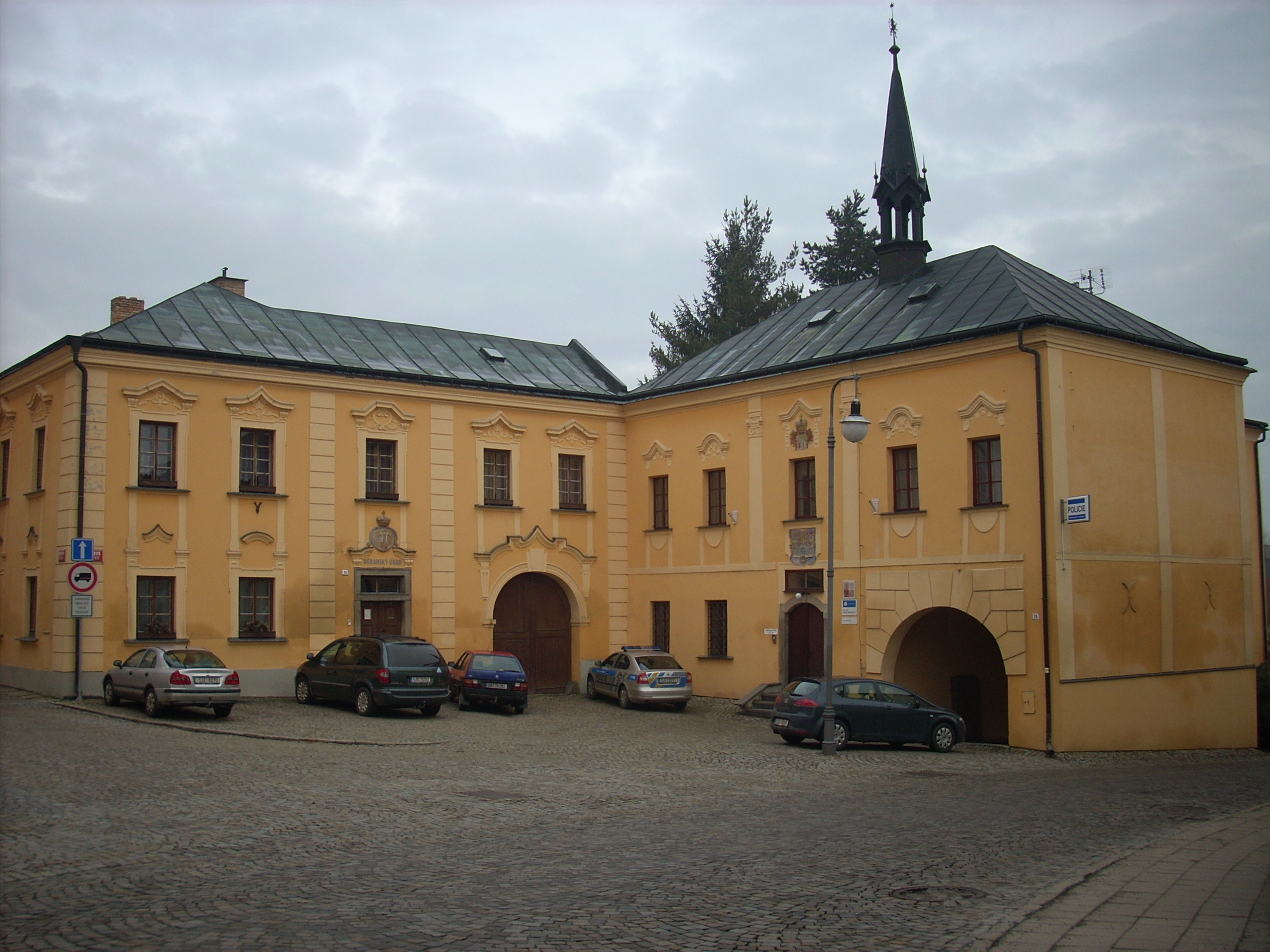 Fara a kaplanka (Polná), Husovo nám. 14, Polná